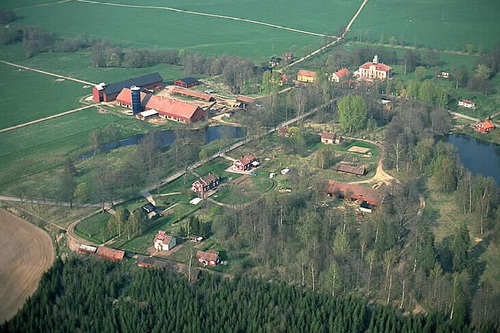 Motiv: Mariedal Nyckelord: Flygbilder, Riksintressen Kategori: Herrgårds-/slottslandskapMariedal